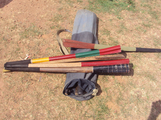 සිංහල: ප්‍රථමයෙන් භාවිතා කරන ලද පොල්පිත්ත